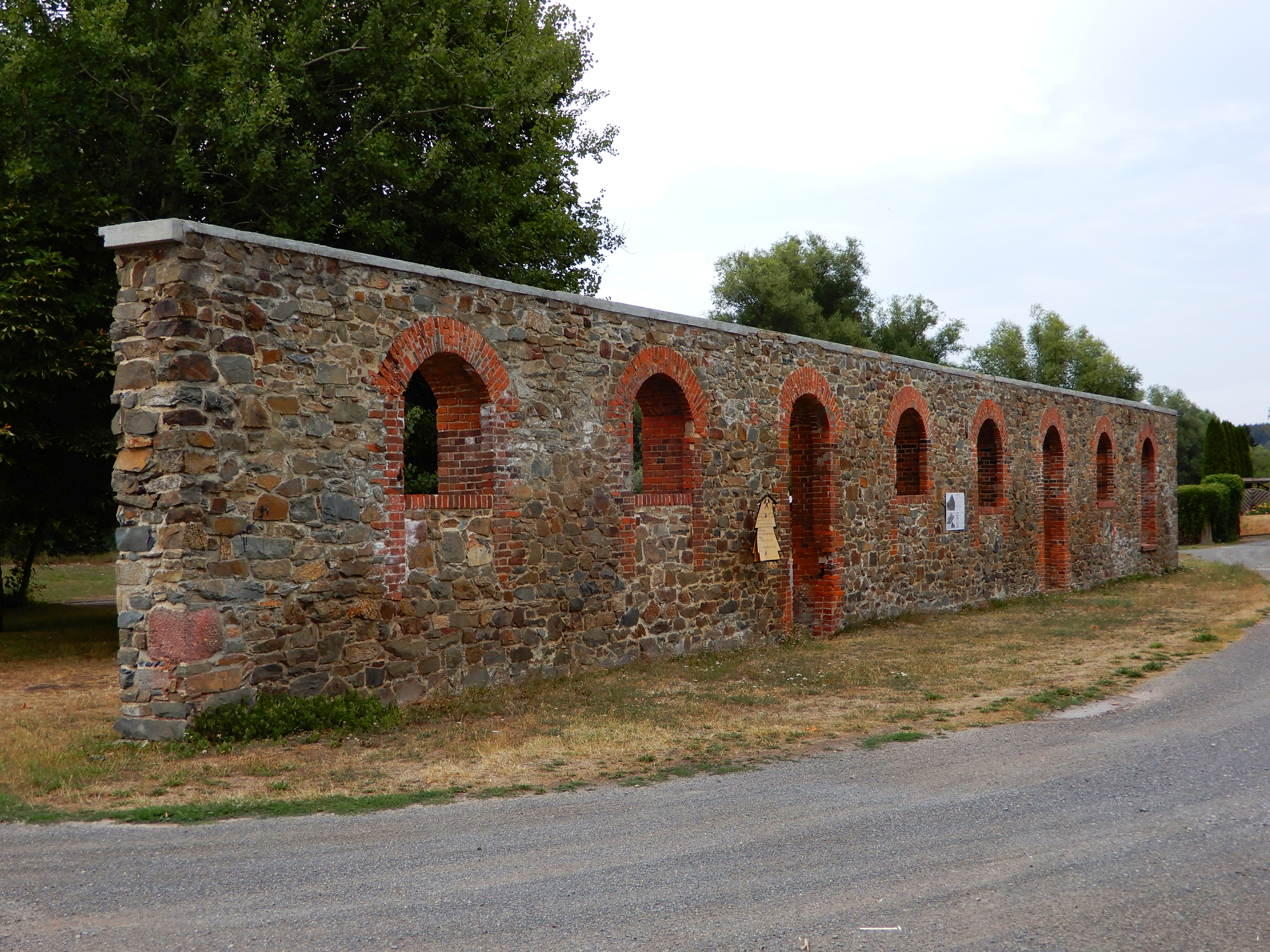 Hüttenwerk Freiheit in Straßberg.